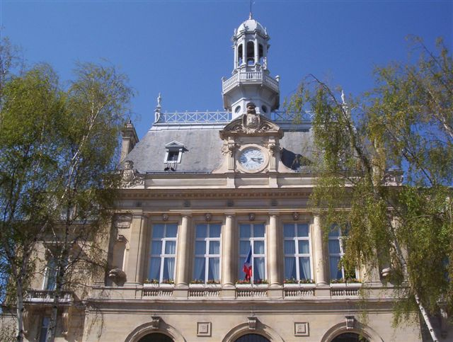 Vue partielle de la Mairie d'Asnières-sur-Seine.